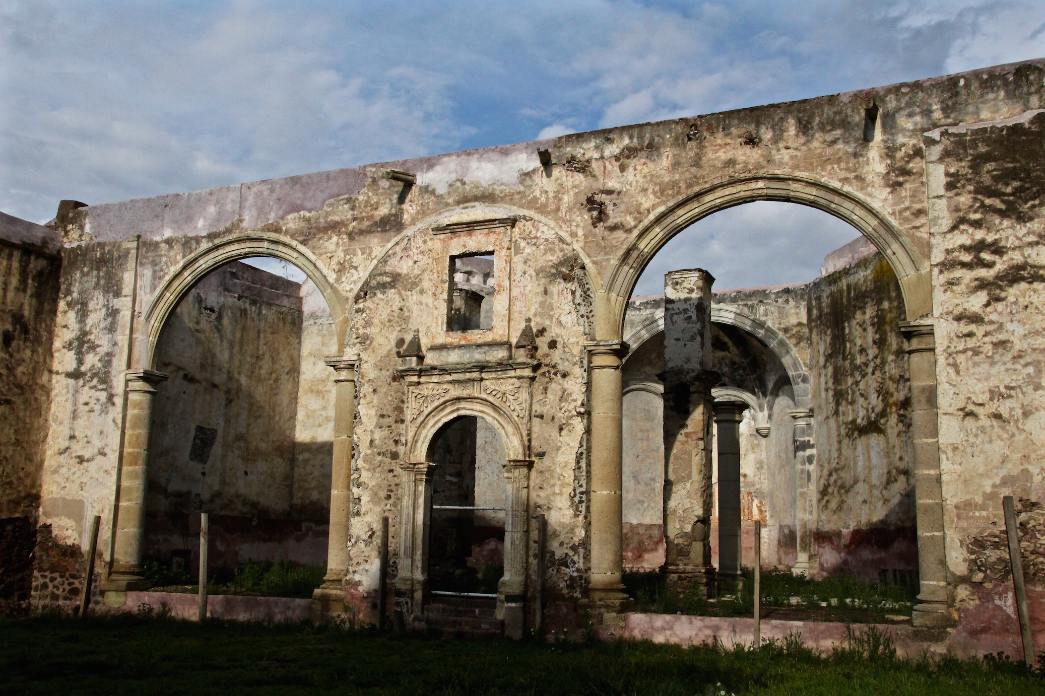 Capilla Abierta de Parroquia de Todos Santos, Zempoala S.XVI